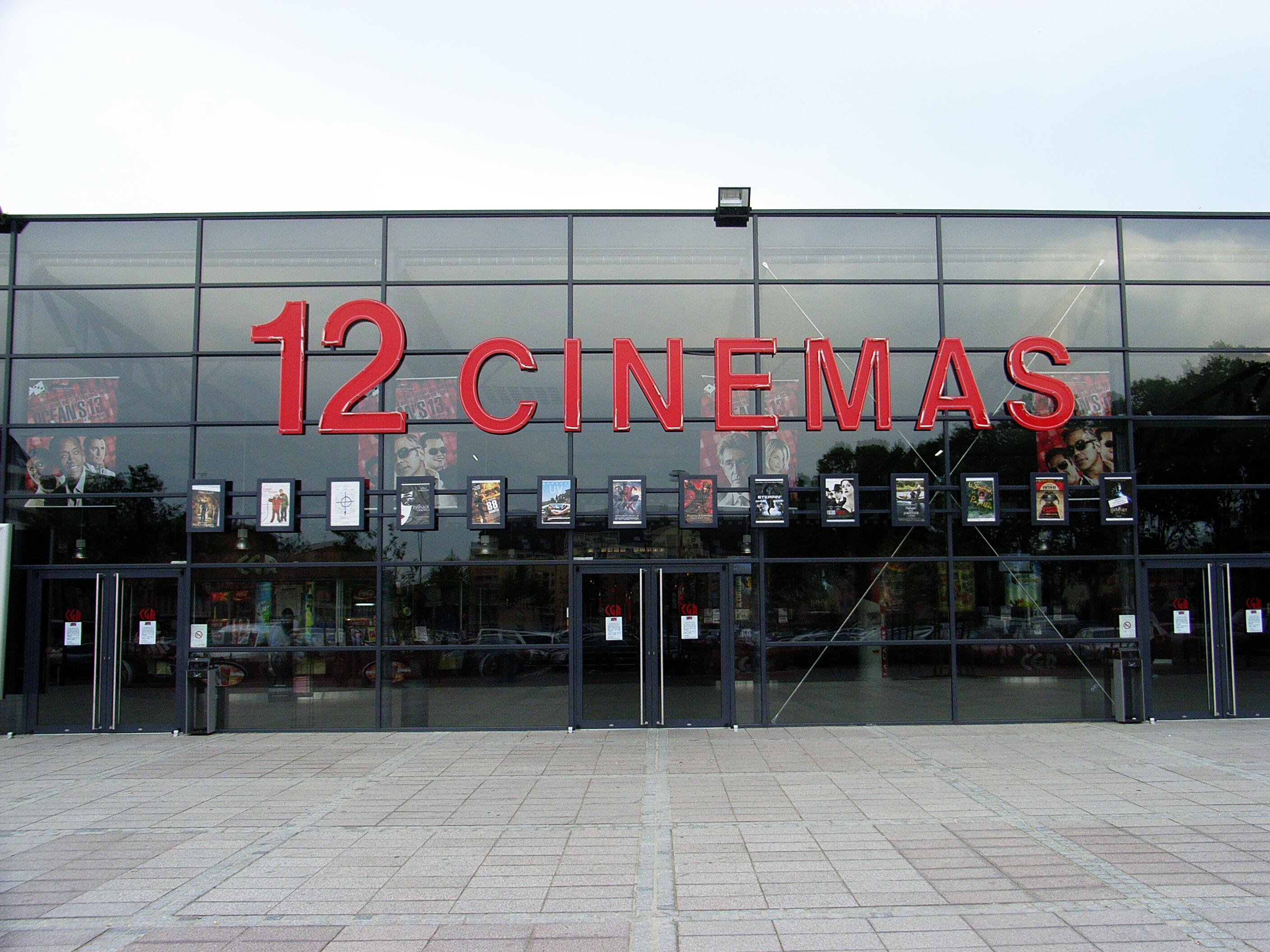 Dieses Bild zeigt den Eingang eines "12 Cinemas" in Colmar.